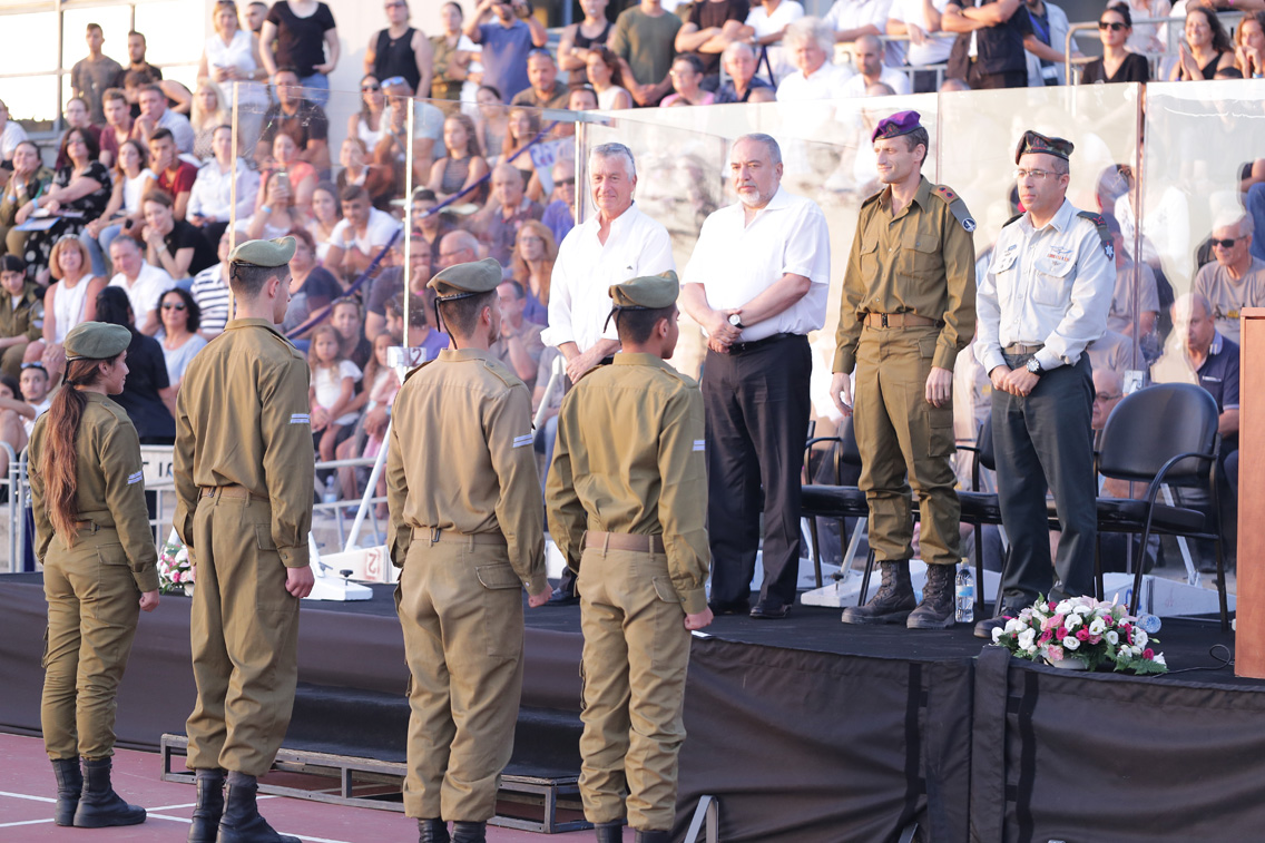 שר הבטחון, אביגדור ליברמן בטקס סיום מחזור ס״ד של הפנימייה הצבאית לפיקוד חיפה, 2018. הענקת סיכות מצטיין לבוגרים